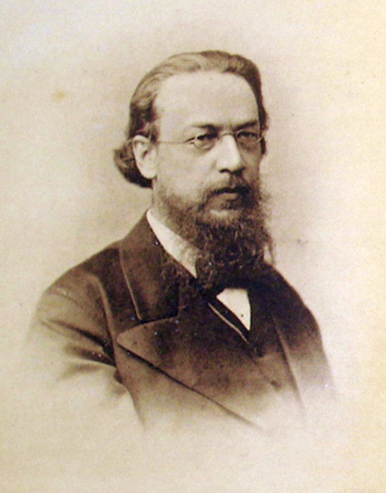 Белоголовый, Николай Андреевич